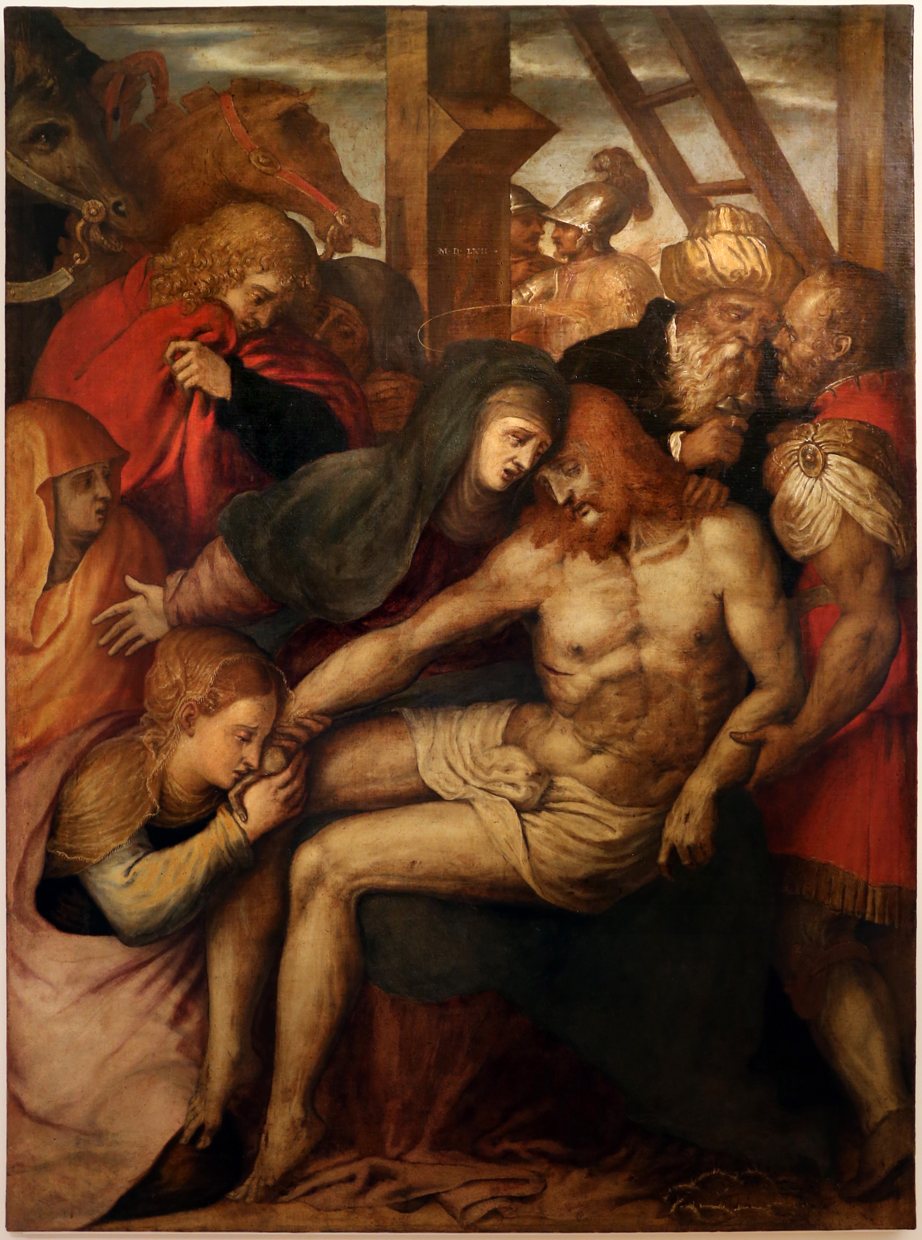 chiesa di San Giacomo Apostolo dei Domenicani This is a photo of a monument which is part of cultural heritage of Italy.